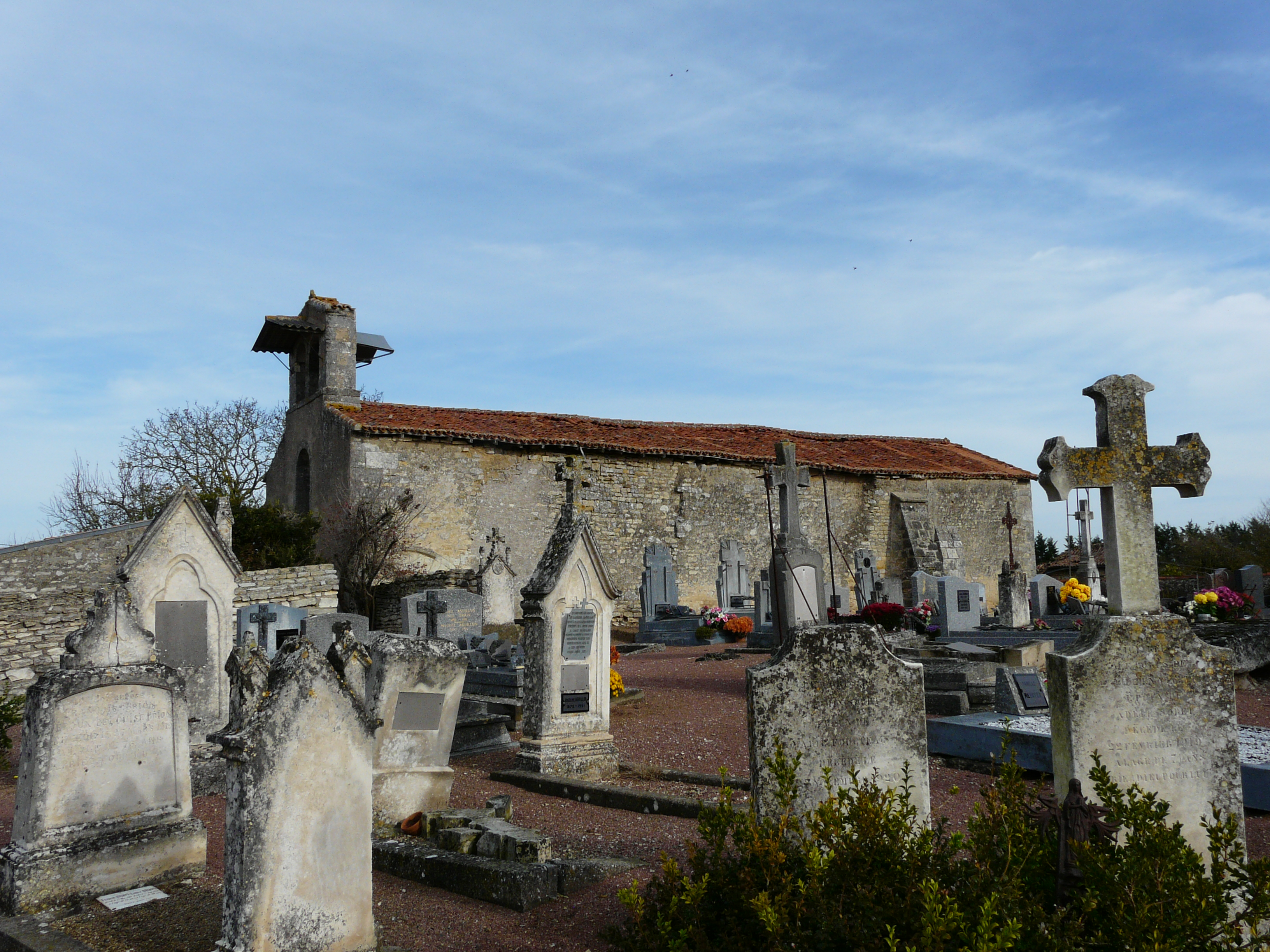 L'église Saint-Martin de Bournezeau, Amberre, Vienne, France